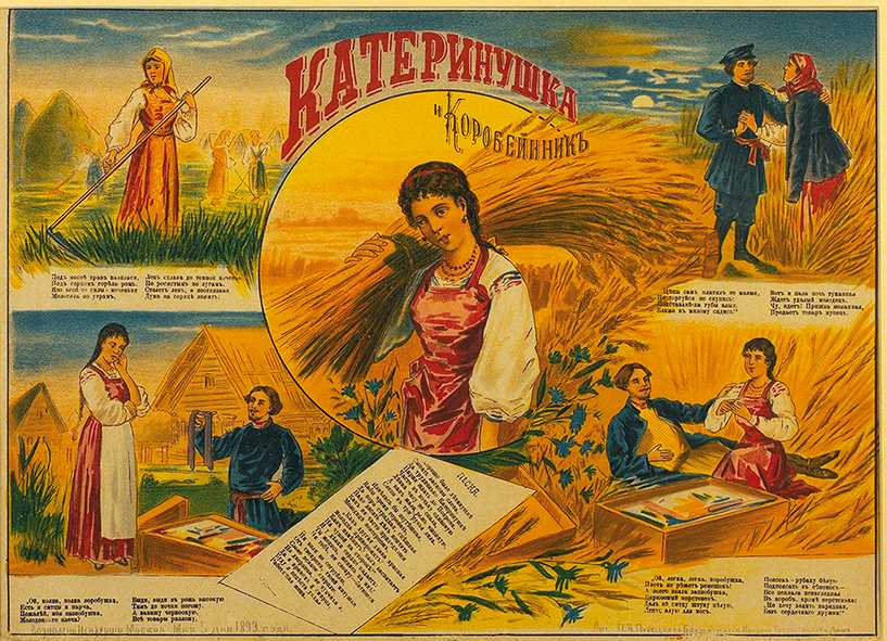 Катеринушка и коробейник. Лубочная картинка. Литогр. т-ва И. Д. Сытина Текст внизу 4+4+4+4+4+4+4+4+4=36 строк, строки 1—24 (первой части)+ 1—8 (пятой части)+29—32 (первой части). Строка 14: «настала» вместо «и пала»; строка 21: «Только знает» вместо «Знает только»; стр. 31: «рубашку» вместо «рубаху».